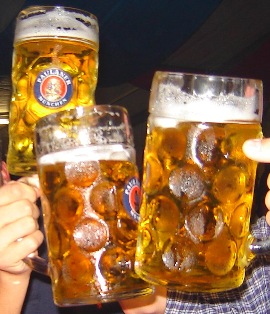 乾杯